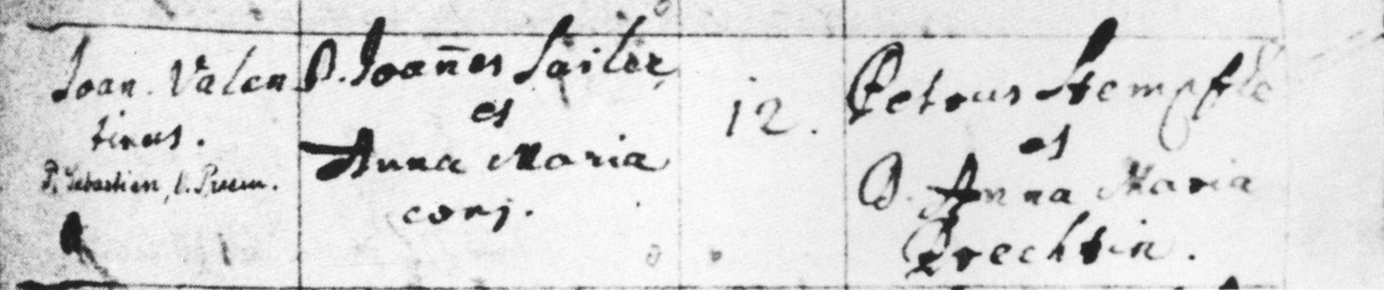 Taufeintrag Sebastian Sailers